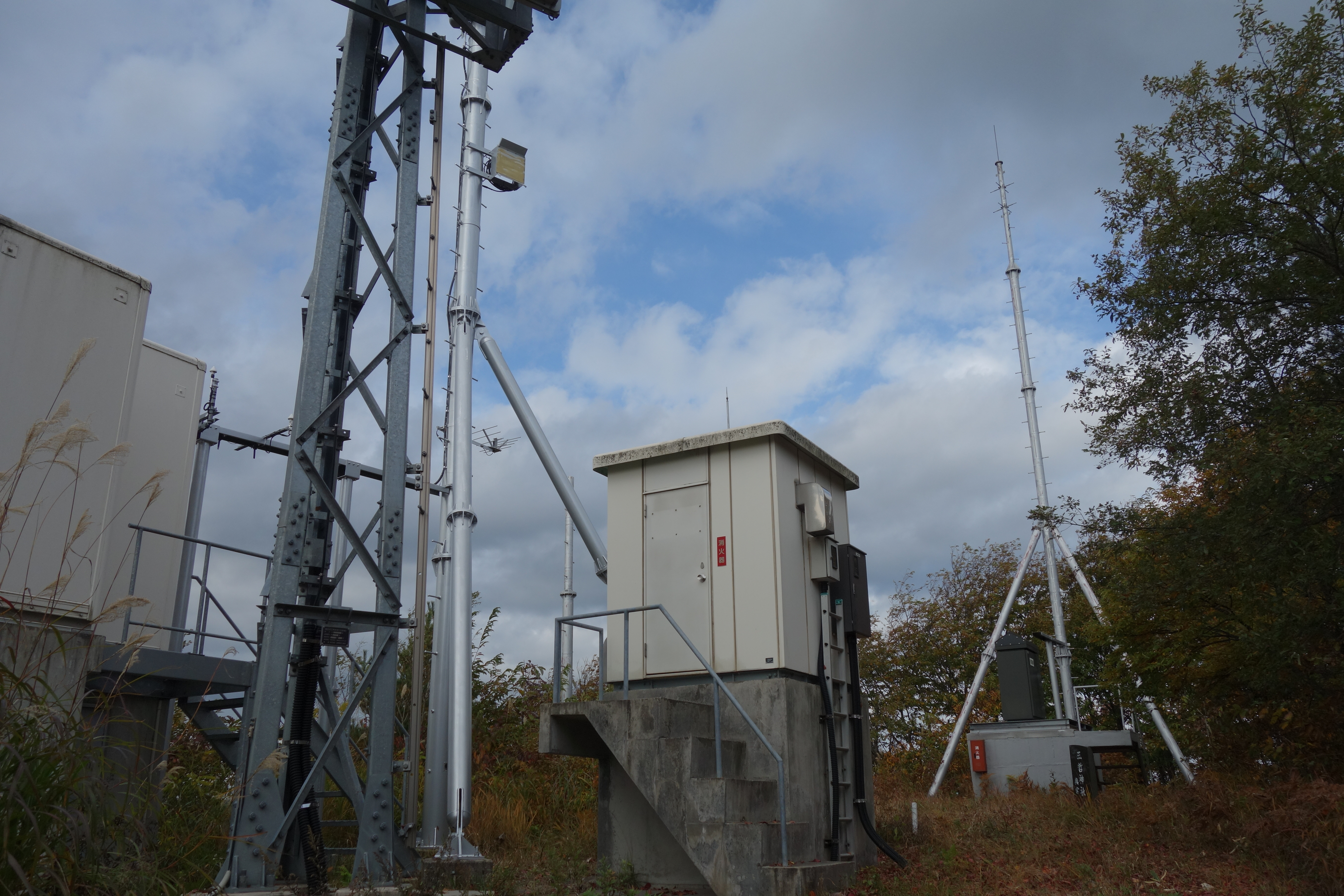 三哲山山頂 山哲神社奥宮の碑、各社携帯電話電波塔、十二所テレビ中継局、三角点などがある。